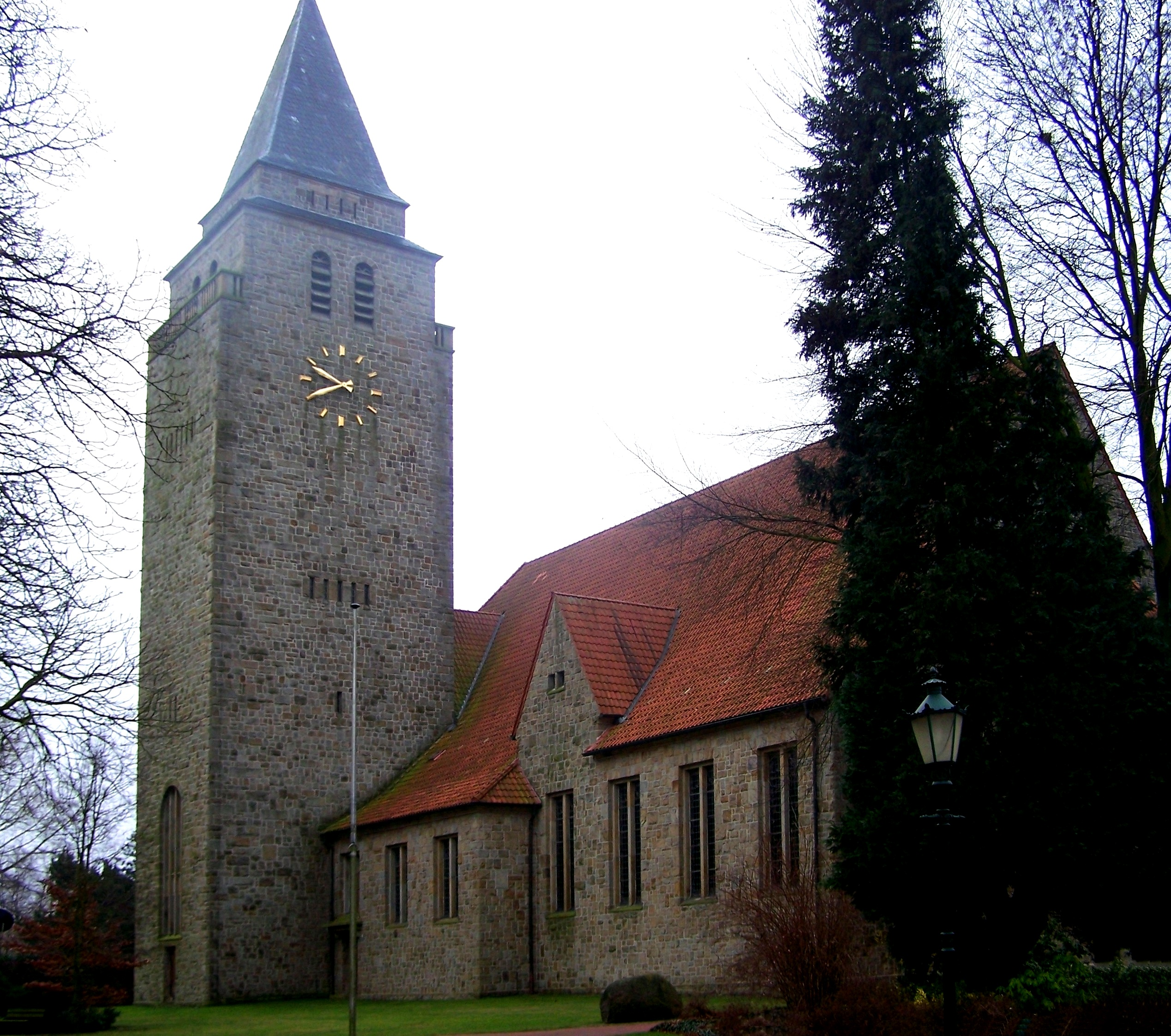 Schapen, kath. Kirche St. Ludgerus